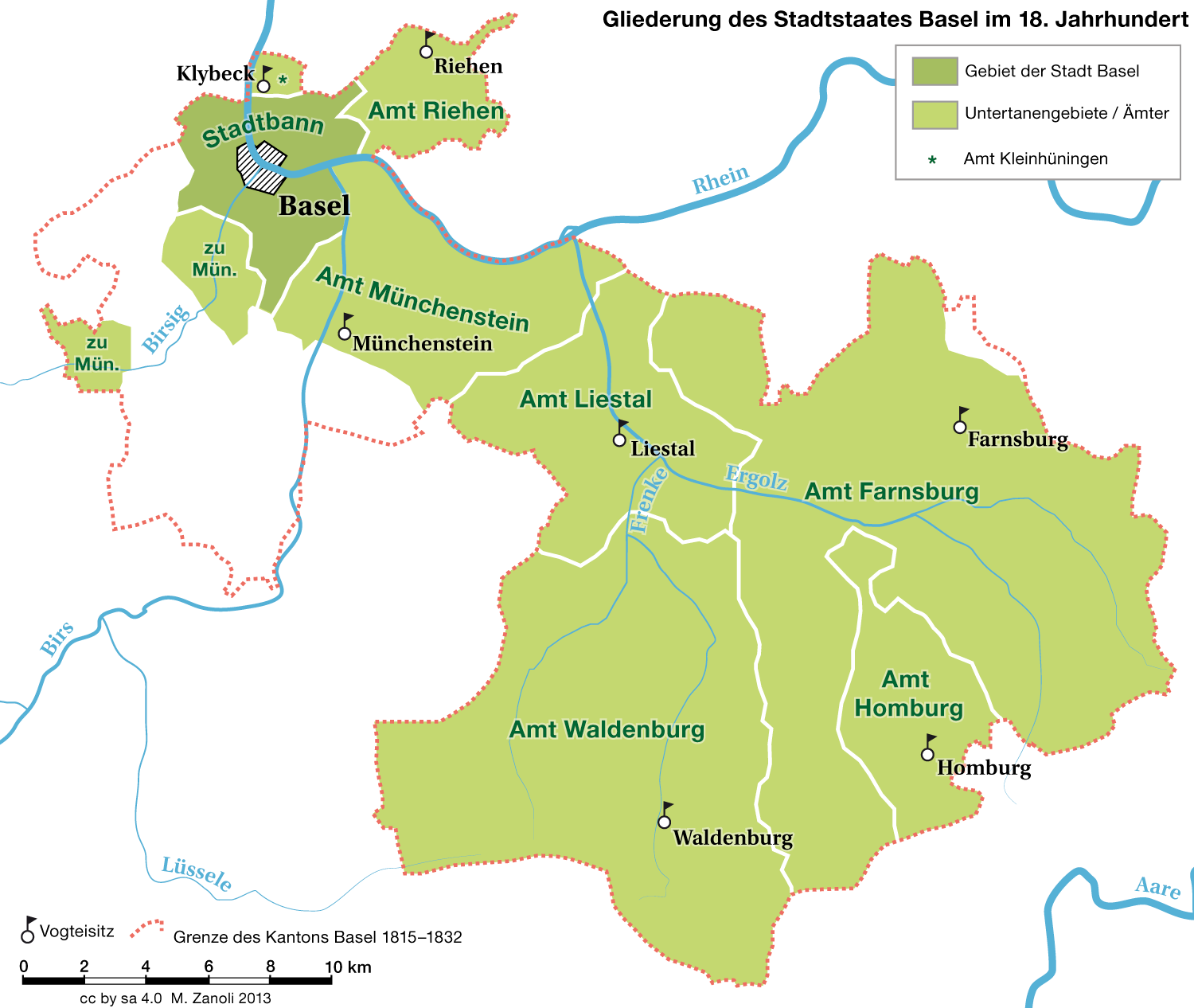 Historische Gliederung des Stadtstaates Basel im 18. Jahrhundert (bis 1798)